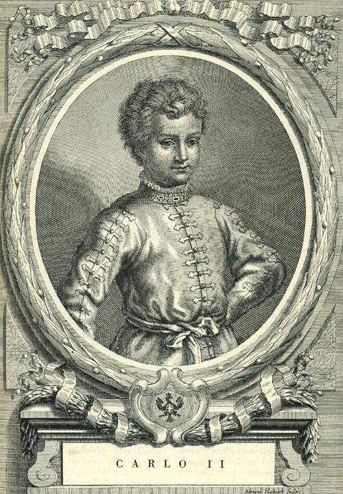 Carlo Giovanni Amedeo di Savoia (–1496)